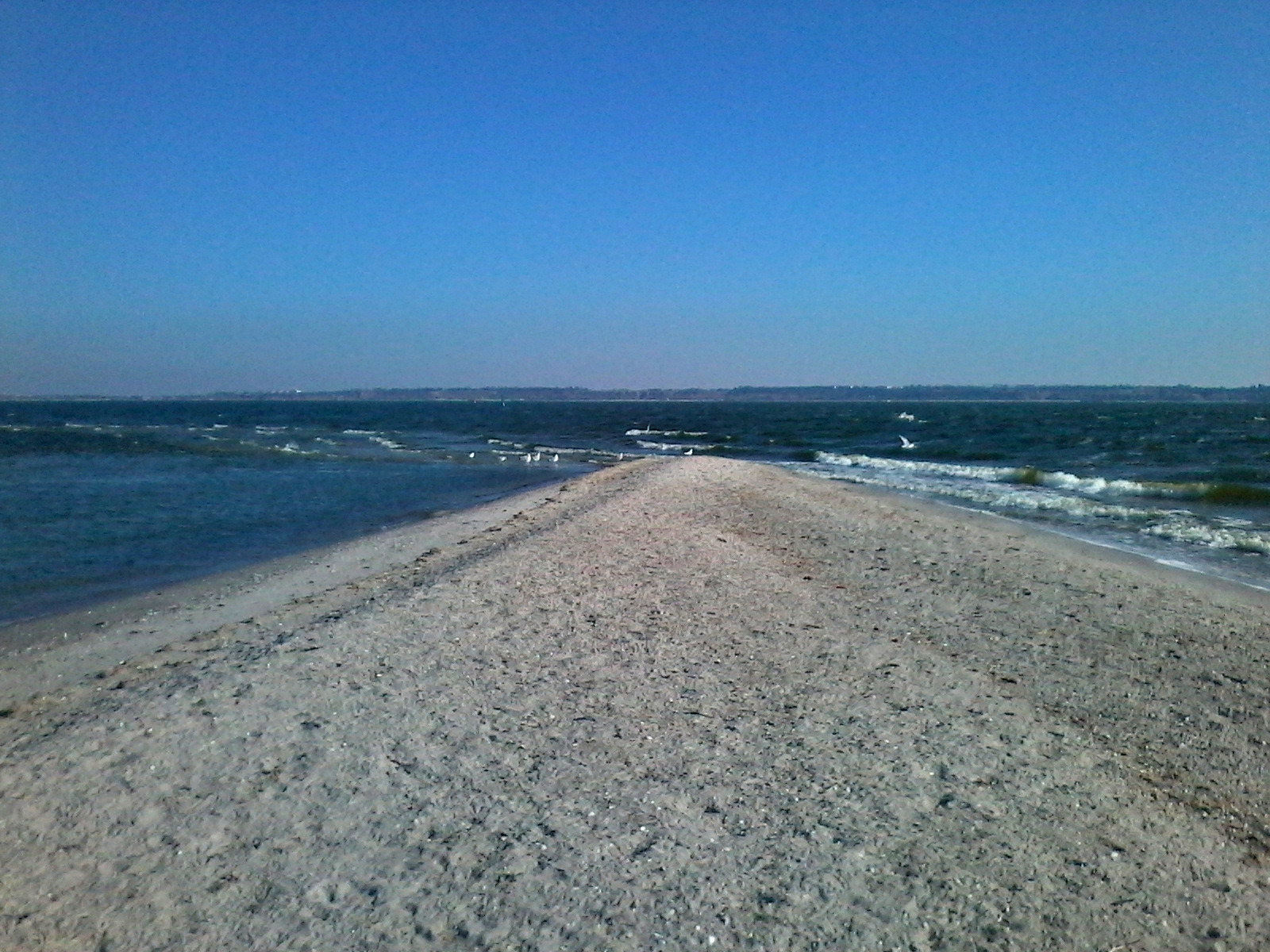 Протока влітку